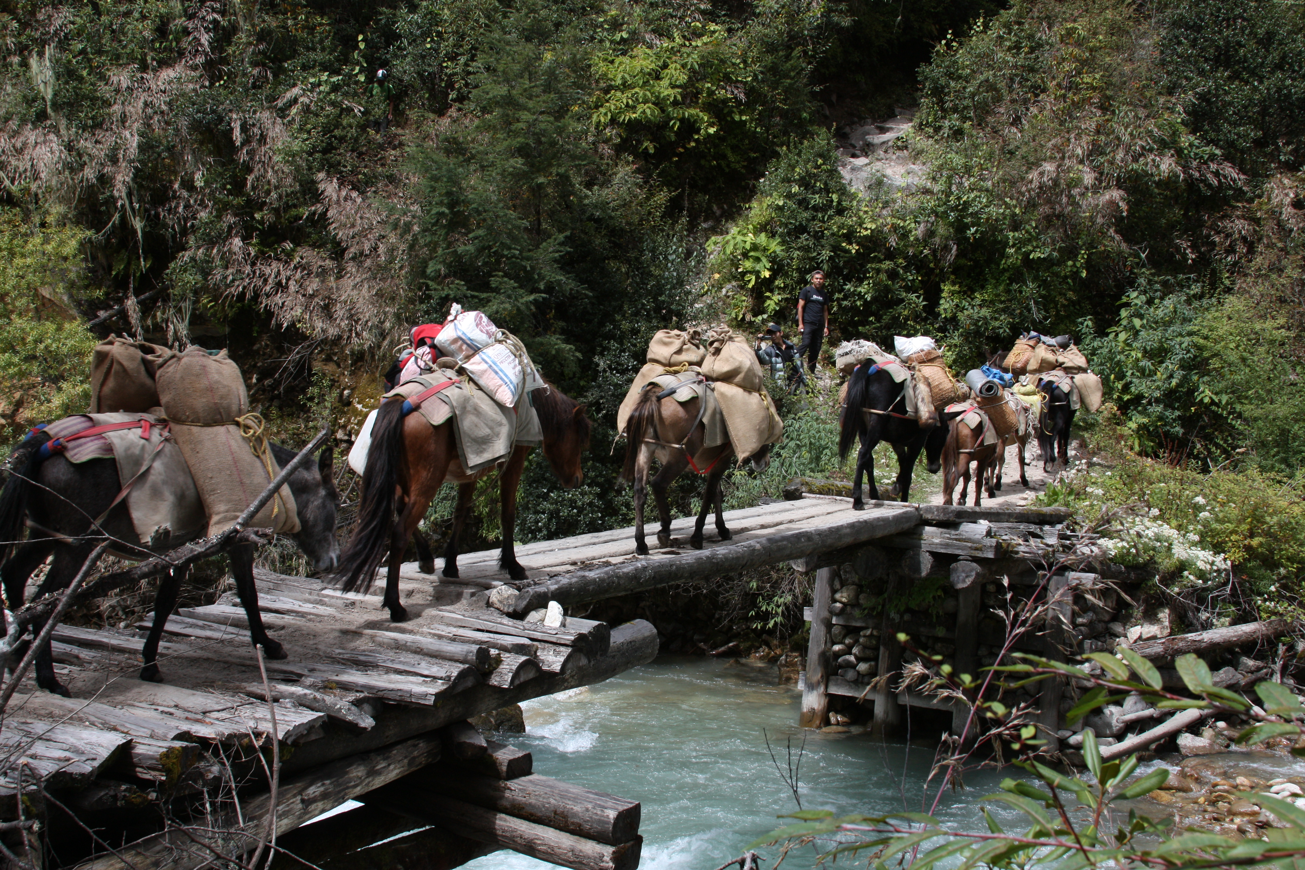 Saumpferde überqueren eine Brücke im Bhutan